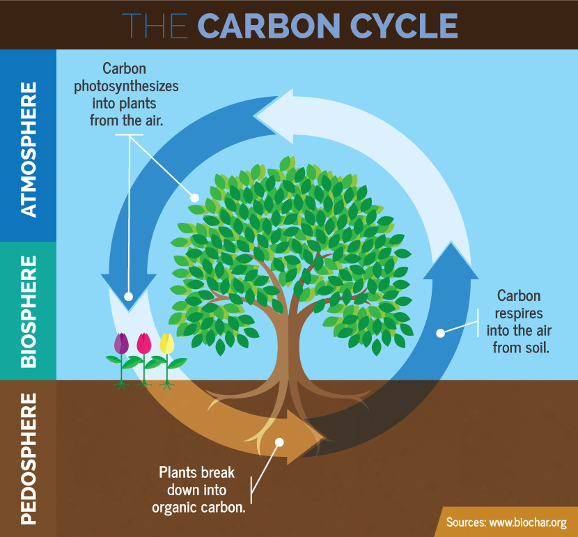 Биосферата и нејзината поврзаност со останатите сфери во јаглеродниот циклус